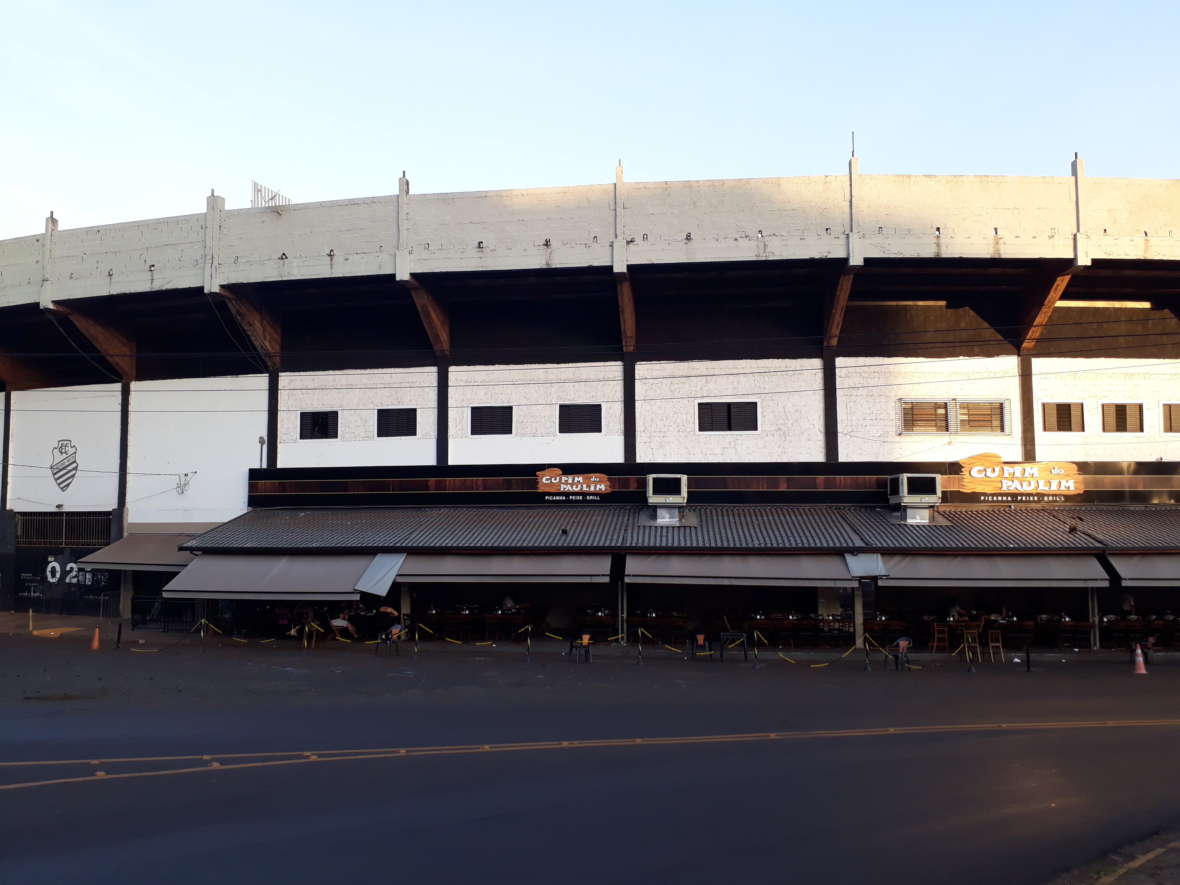 Imagem parcial da fachada do Estádio do Comercial Futebol Clube de Ribeirão Preto/SP.